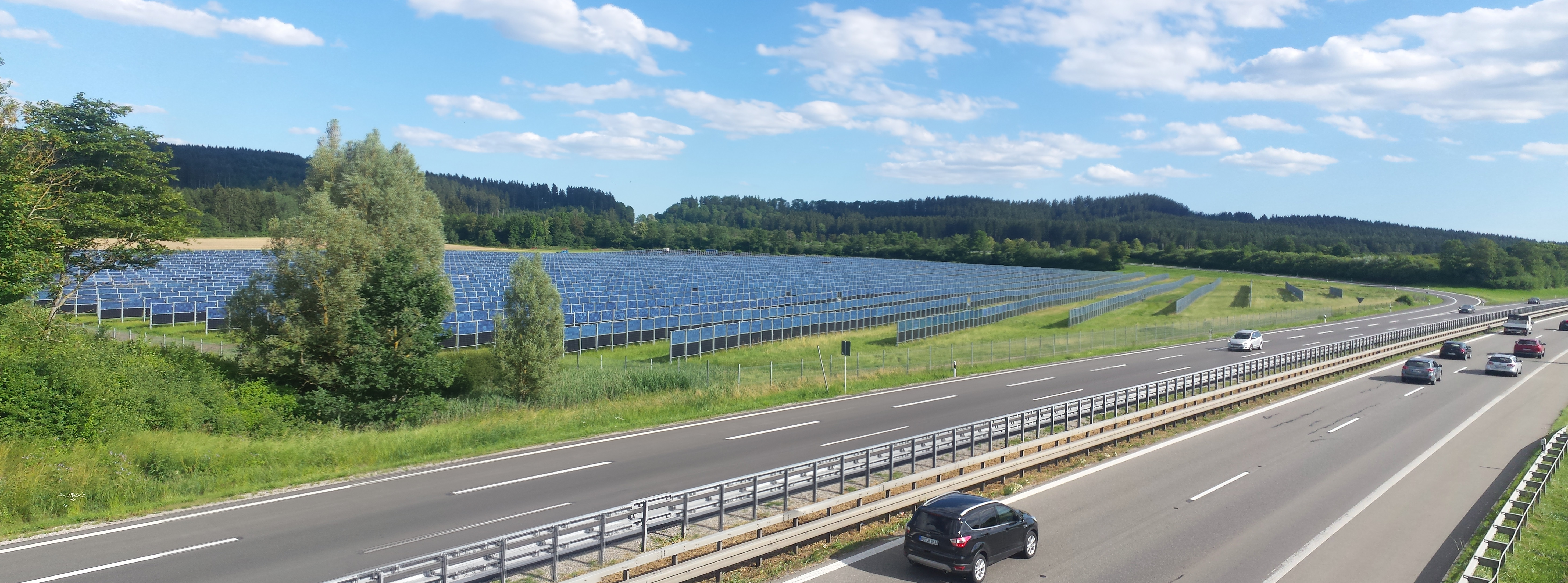 Agrivoltaikanlage Assen bei Donaueschingen an der B27 und A864